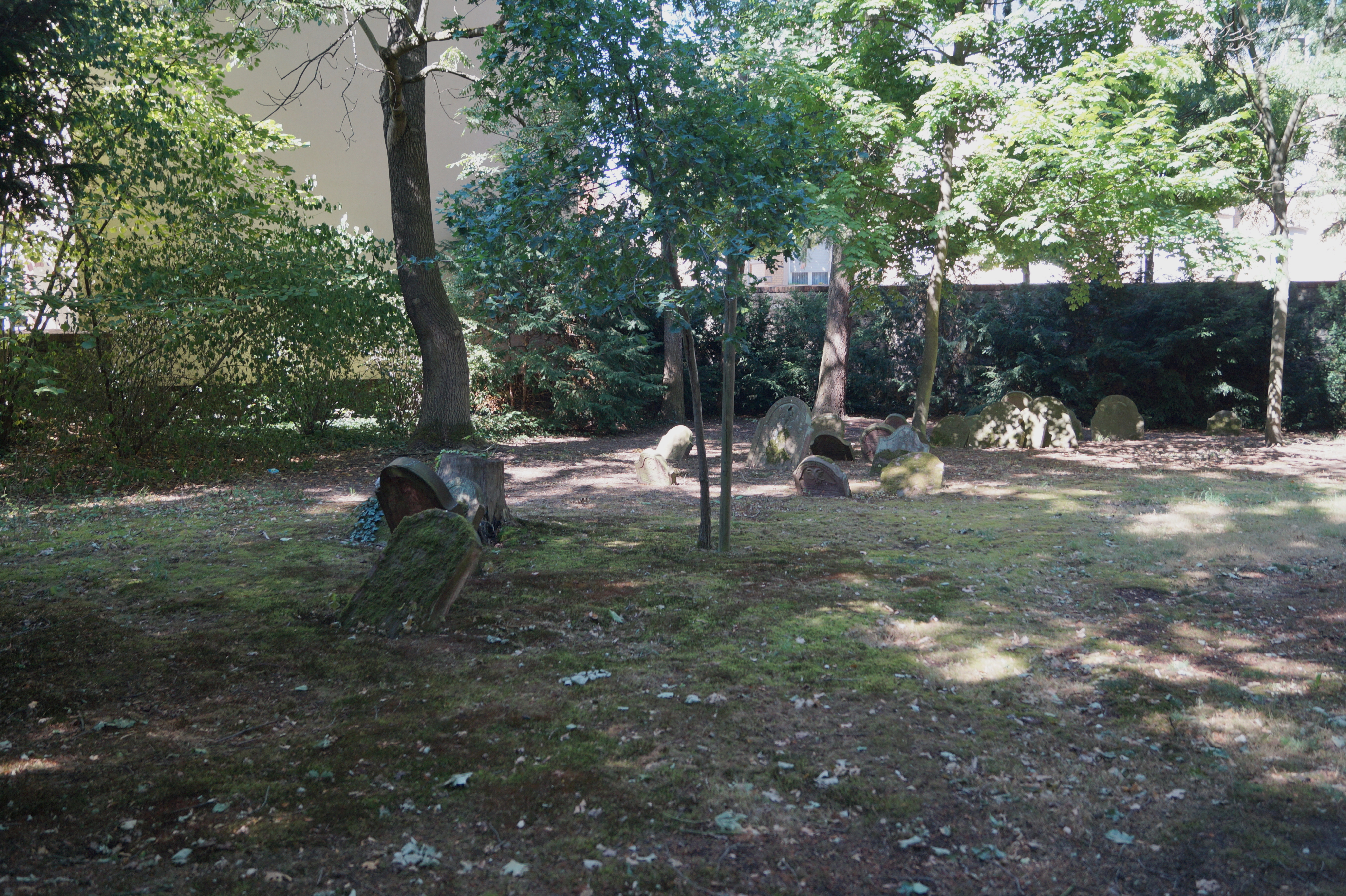 Jüdischer Friedhof Hanau, Mühlstraße. Ansicht des ältesten Teils im Norden der Anlage mit stark eingesunkenen Grabsteinen.